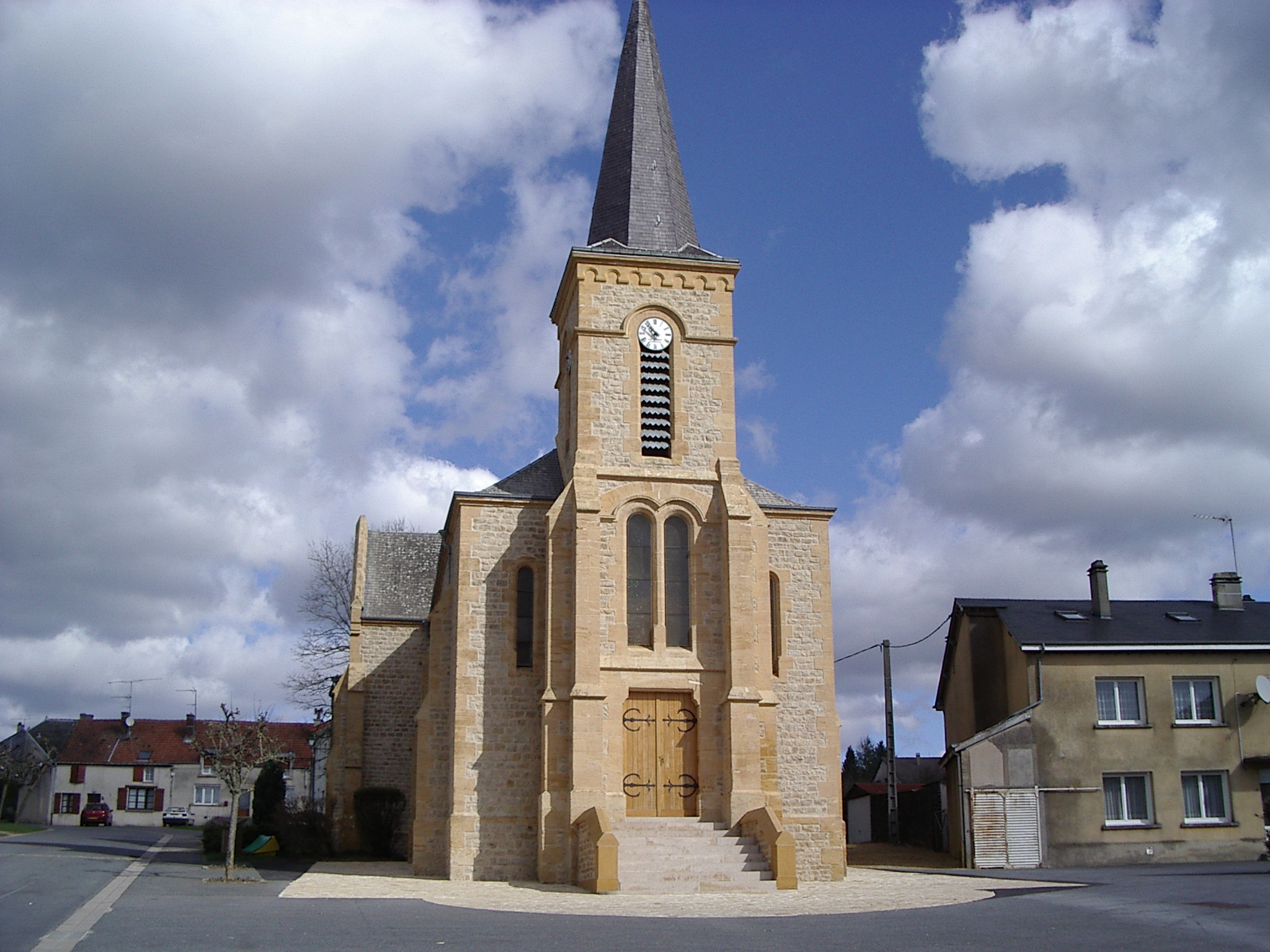 Eglise bosseval et Briancourt Ardennes France